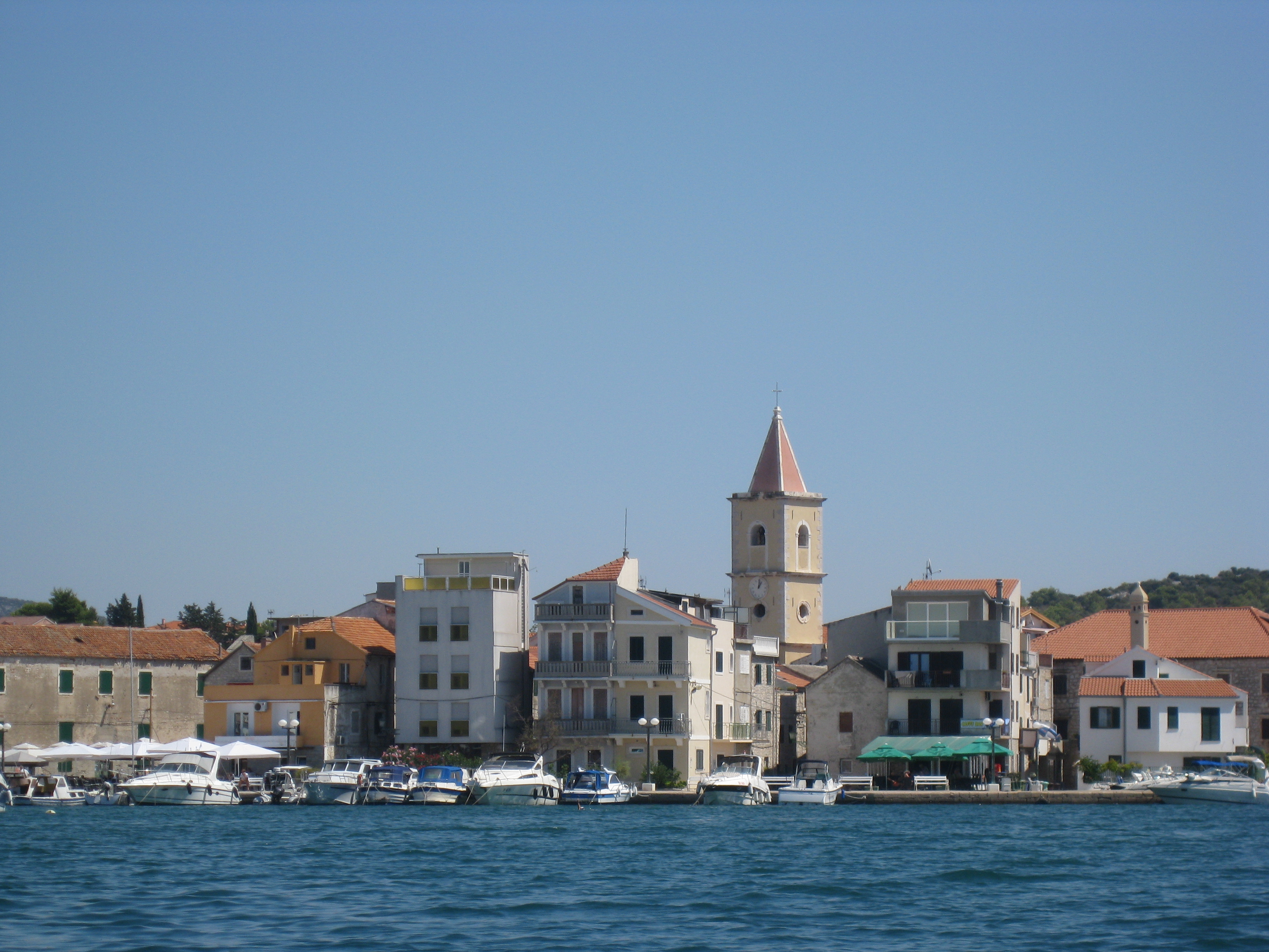 Pirovac, August 2013, vom Meer aus gesehen